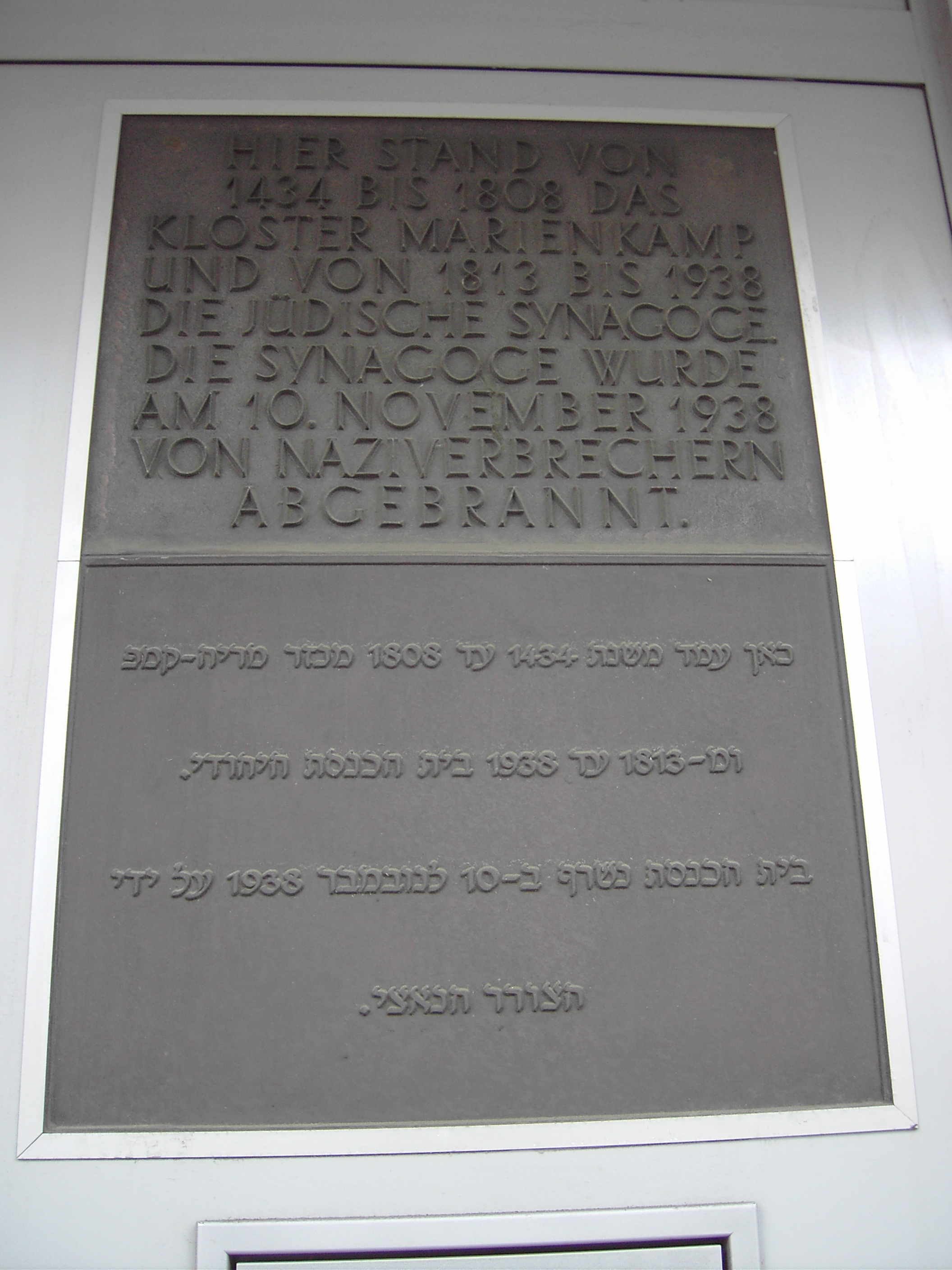 Ehemaliger Standort der Klosterkirche Marienkamp und Synagoge in Dinslaken